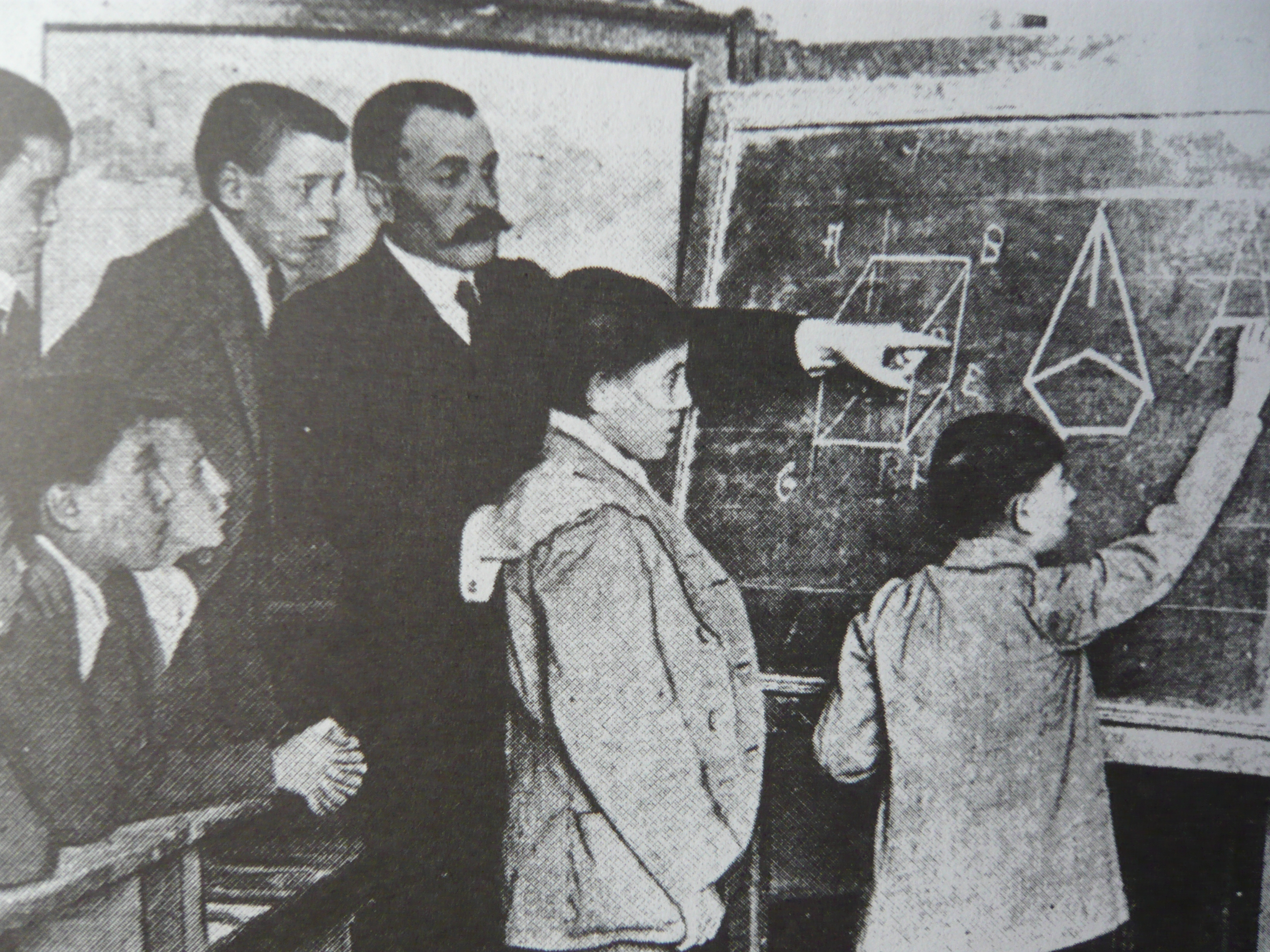 Imagen tomada directamente de la revista